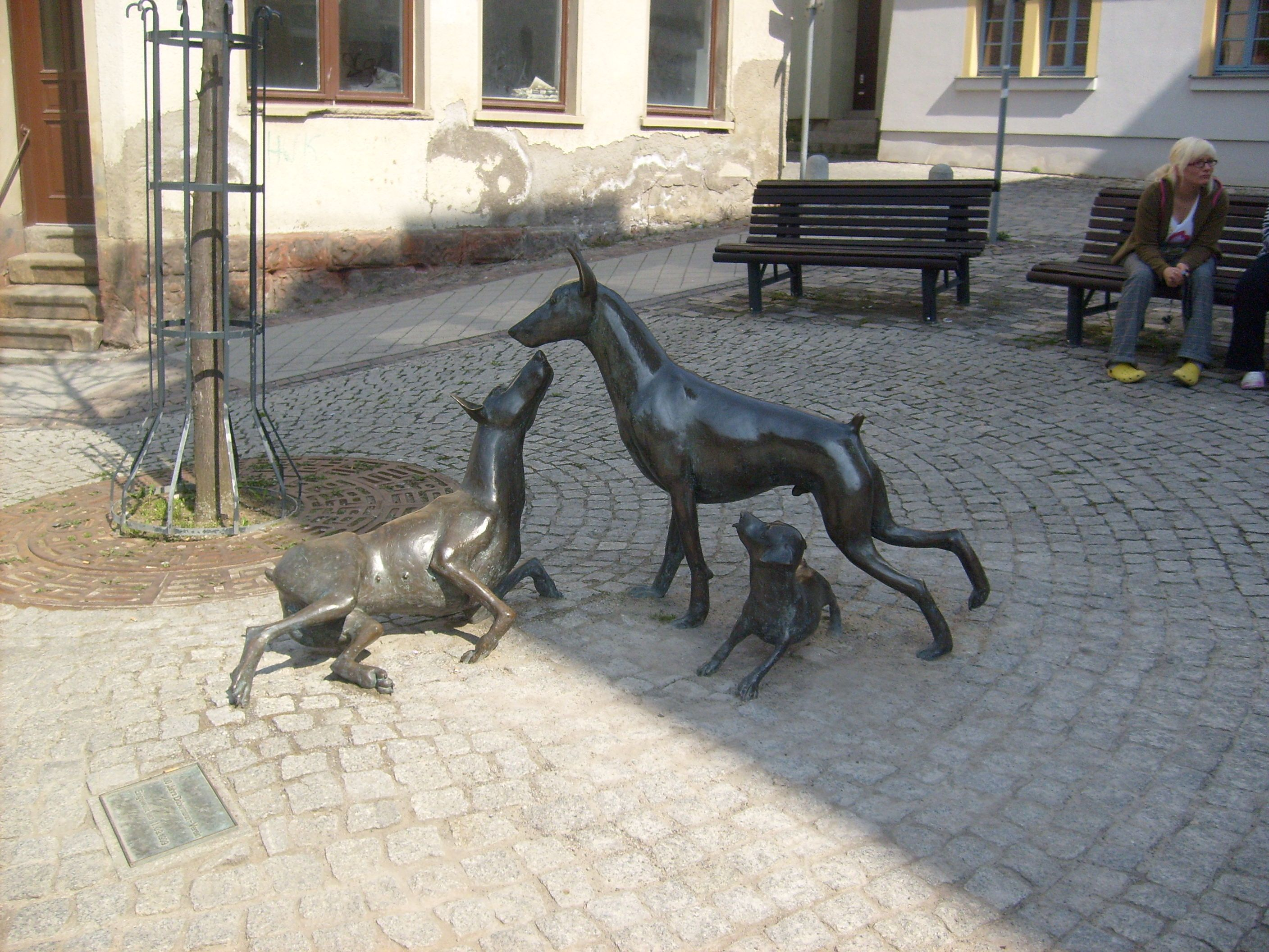 Dobermann-Denkmal